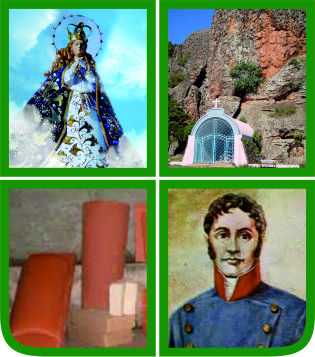 Escudo de la ciudad de Tobatí en Paraguay.